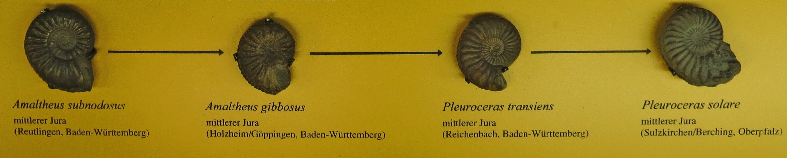 Took the picture at Museum Mensch und Natur, Munchen